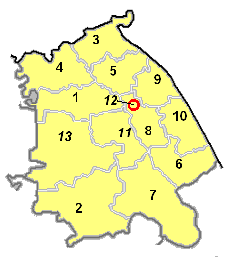 Карта административного деления Павлодарской области